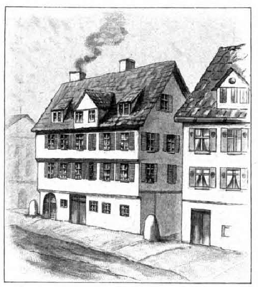 Schillerhaus Stuttgart, Eberhardstraße 63, 1780. Hier wohnte Friedrich Schiller vom 1. Februar 1781 bis zum 23. September 1782, als er nach Mannheim flüchtet. Das Haus wurde 1855 abgerissen. Heute (2017) steht an dieser Stelle ein modernes Gebäude.